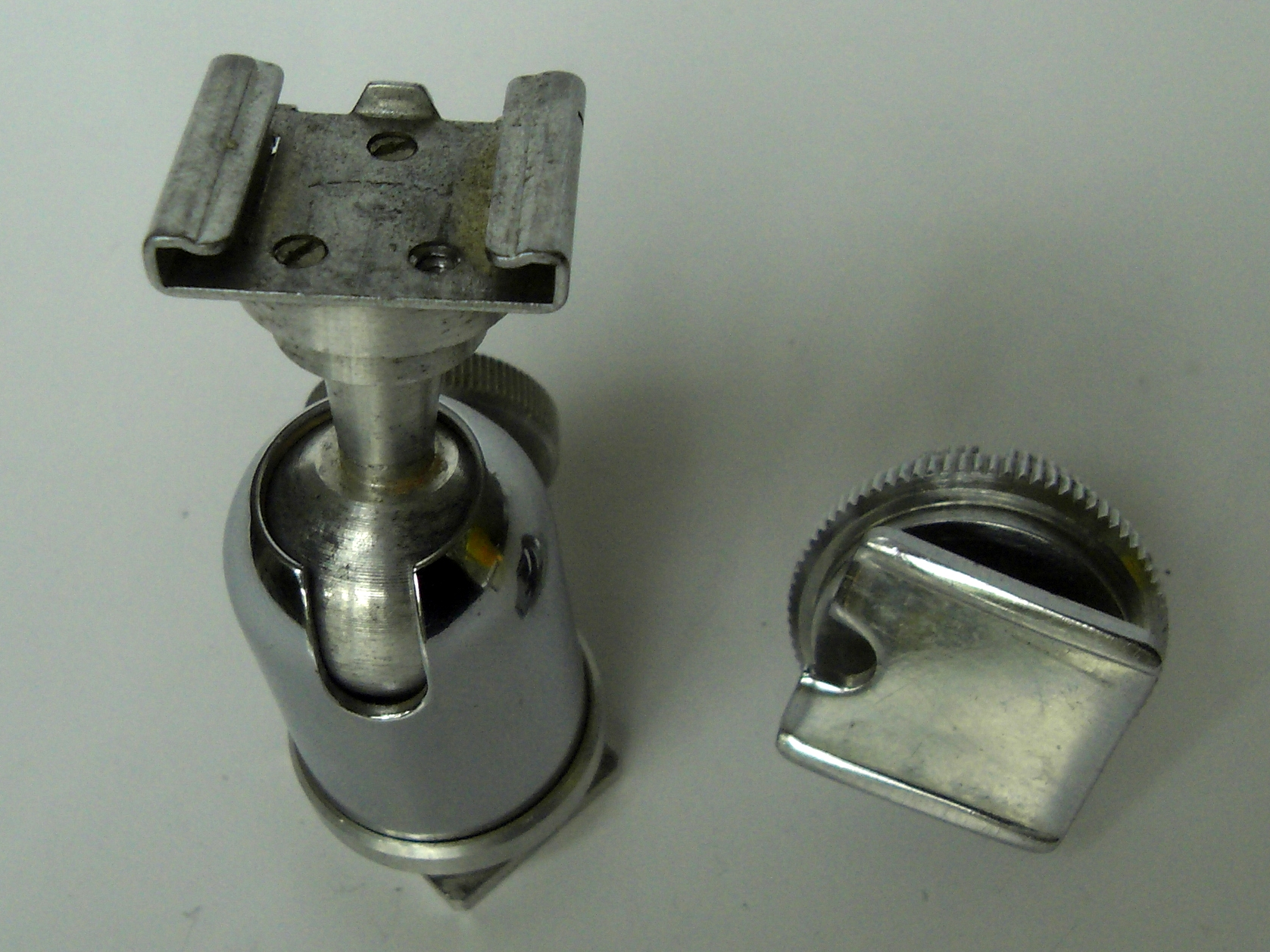 Blitzschuhaufsätze, einer mit Kugelgelenk